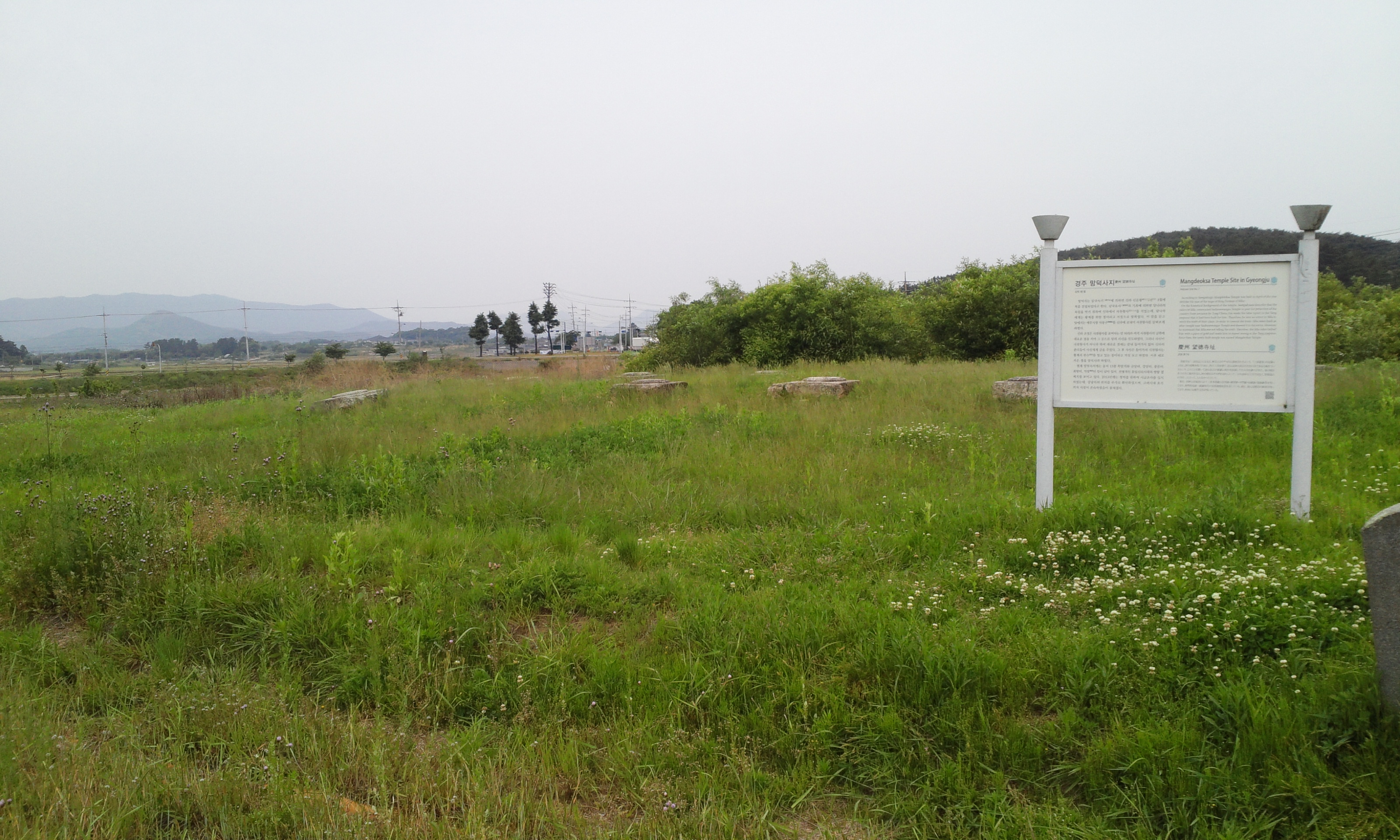 경주 망덕사지